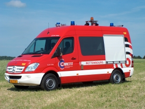 Den ELW 1 1